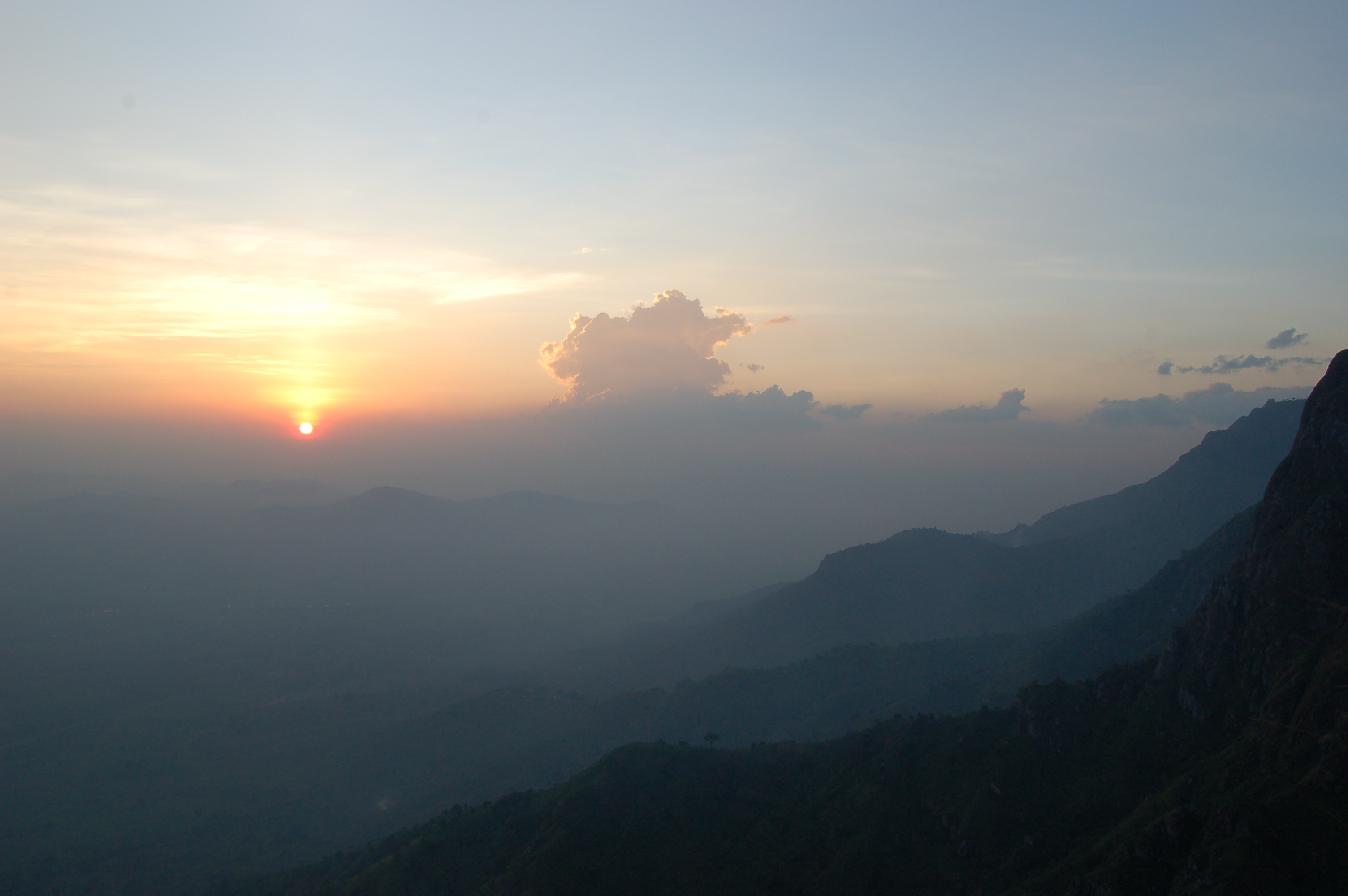 Usambara Mountains, Tanzania